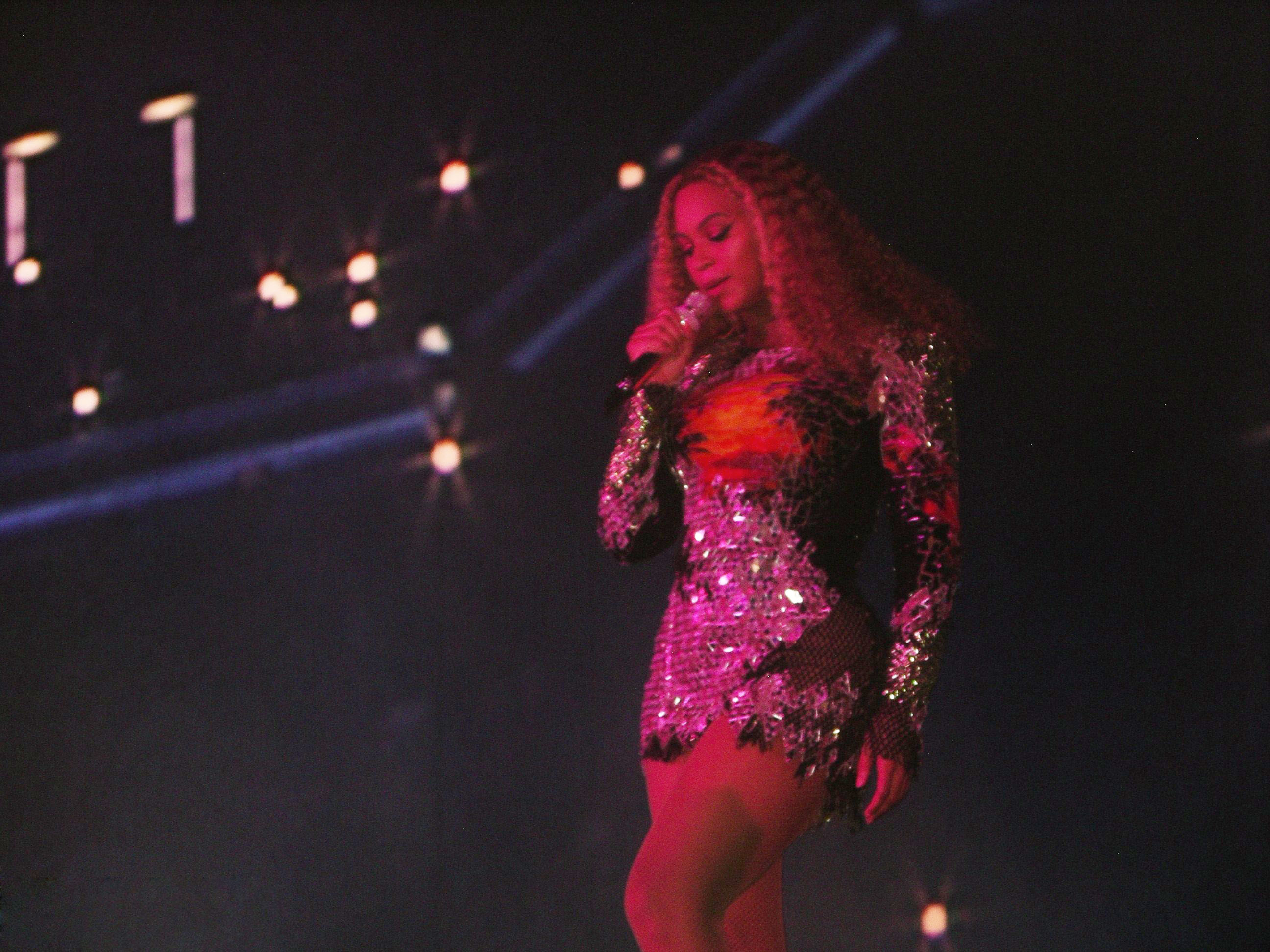 Beyonce en Roma durante el On the Run Tour II el 8 de julio de 2018 en el Stadio Olimpico